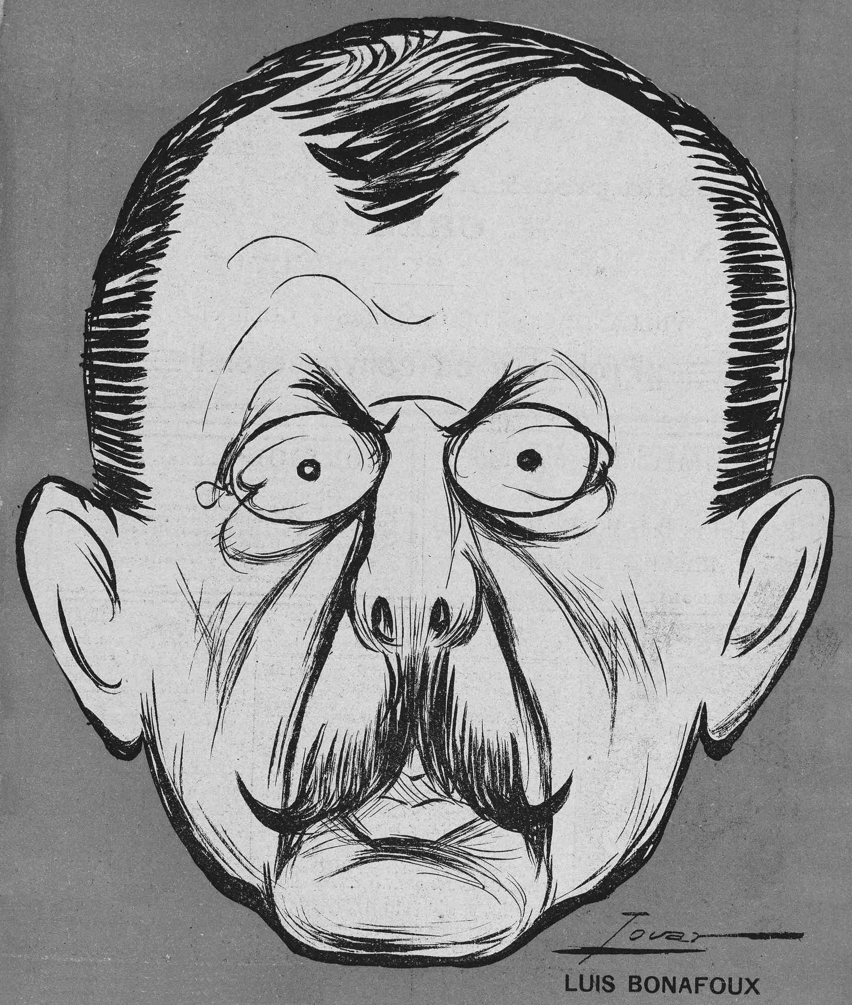 Eduardo de Palacio.Descarado "Chantecler" su lengua se queda solacuando empieza á demoler;es la víbora de Asnieresy de la prensa española